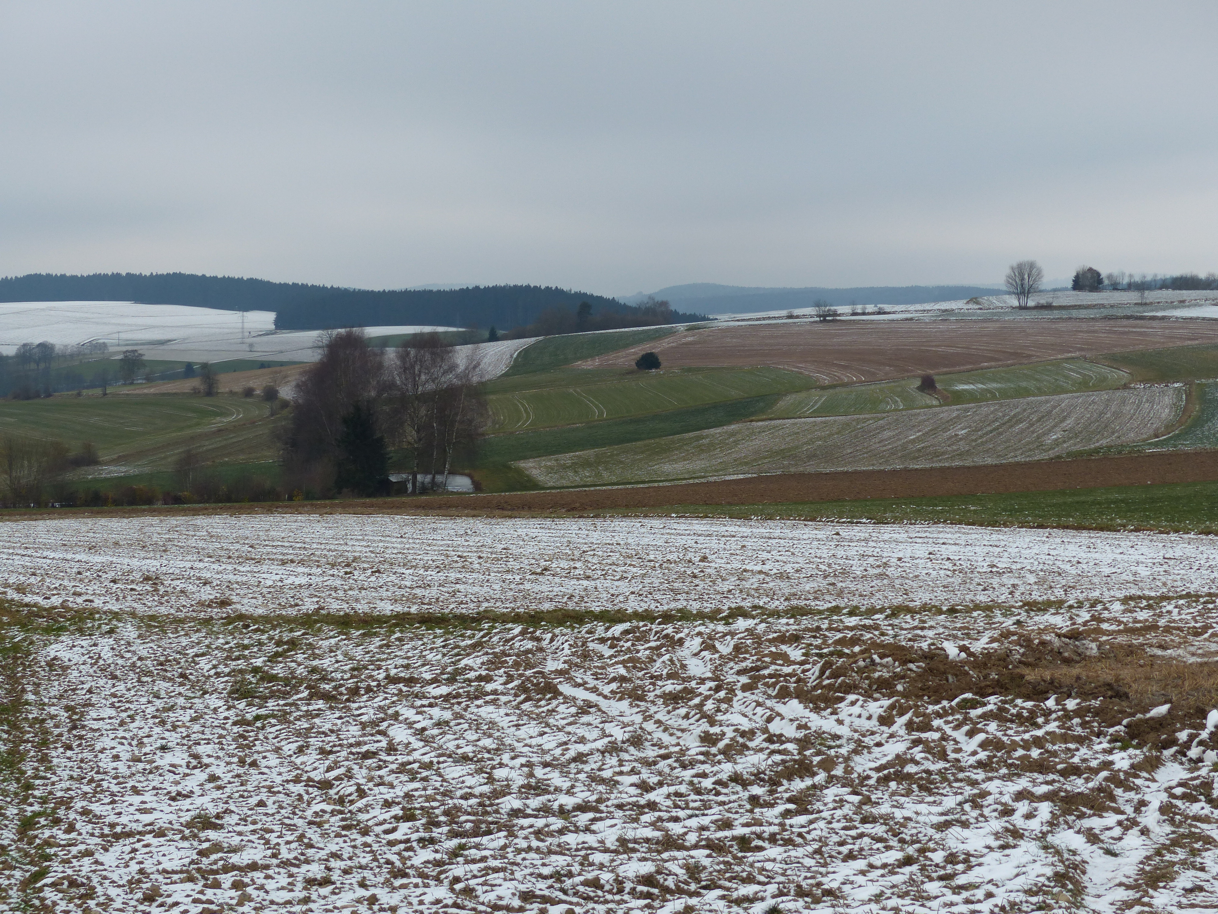 Wüstung Lauterbach zwischen Volkmannsgrün und Neudorf, Blick aus Richtung Neudorf, Fluren laufen sternförmig zusammen